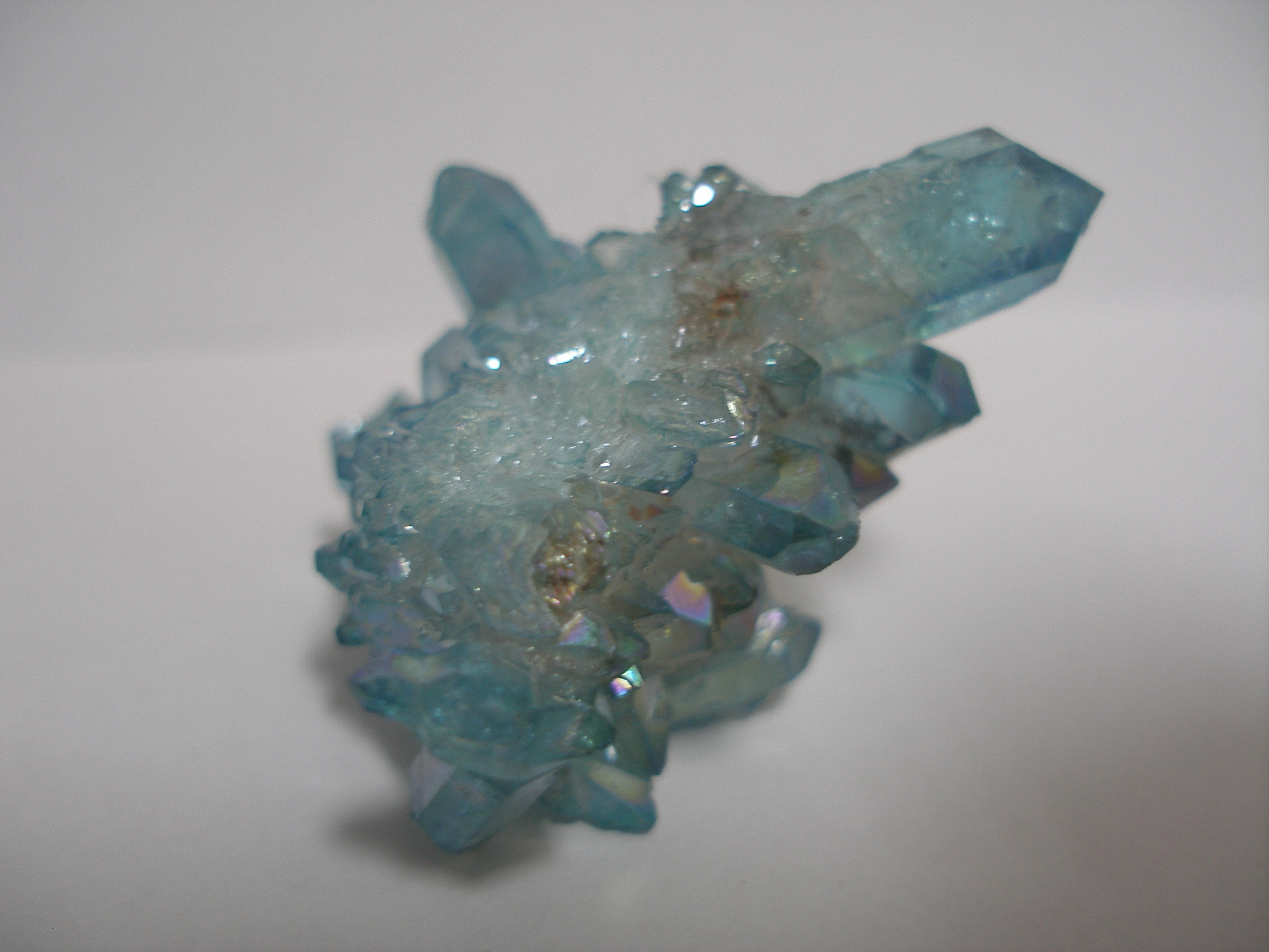 Aqua aura (hebrew: אקווה אורה)